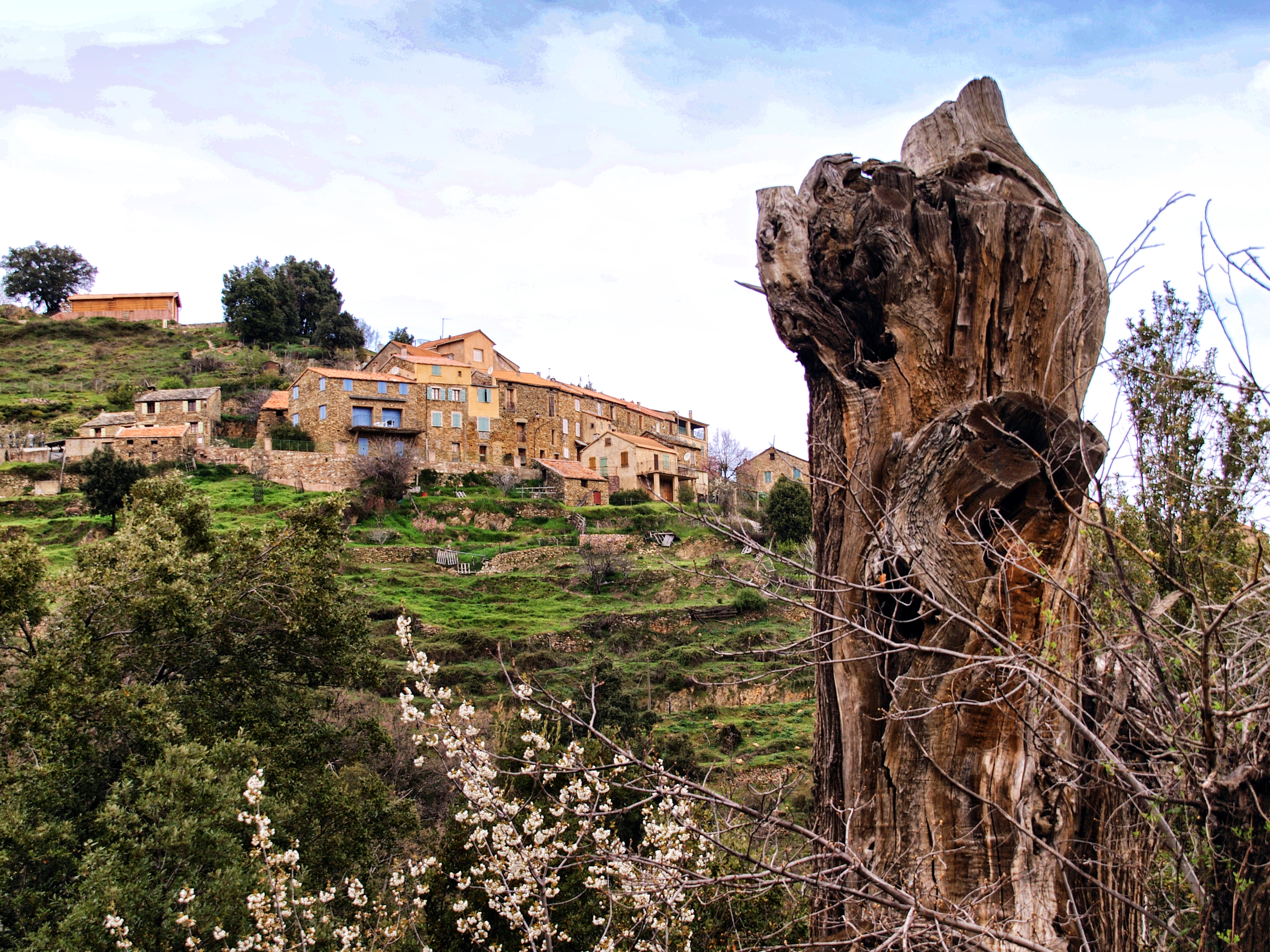 Aiti, Casaluna (Castagniccia / Corse) - Quartier Sud du village